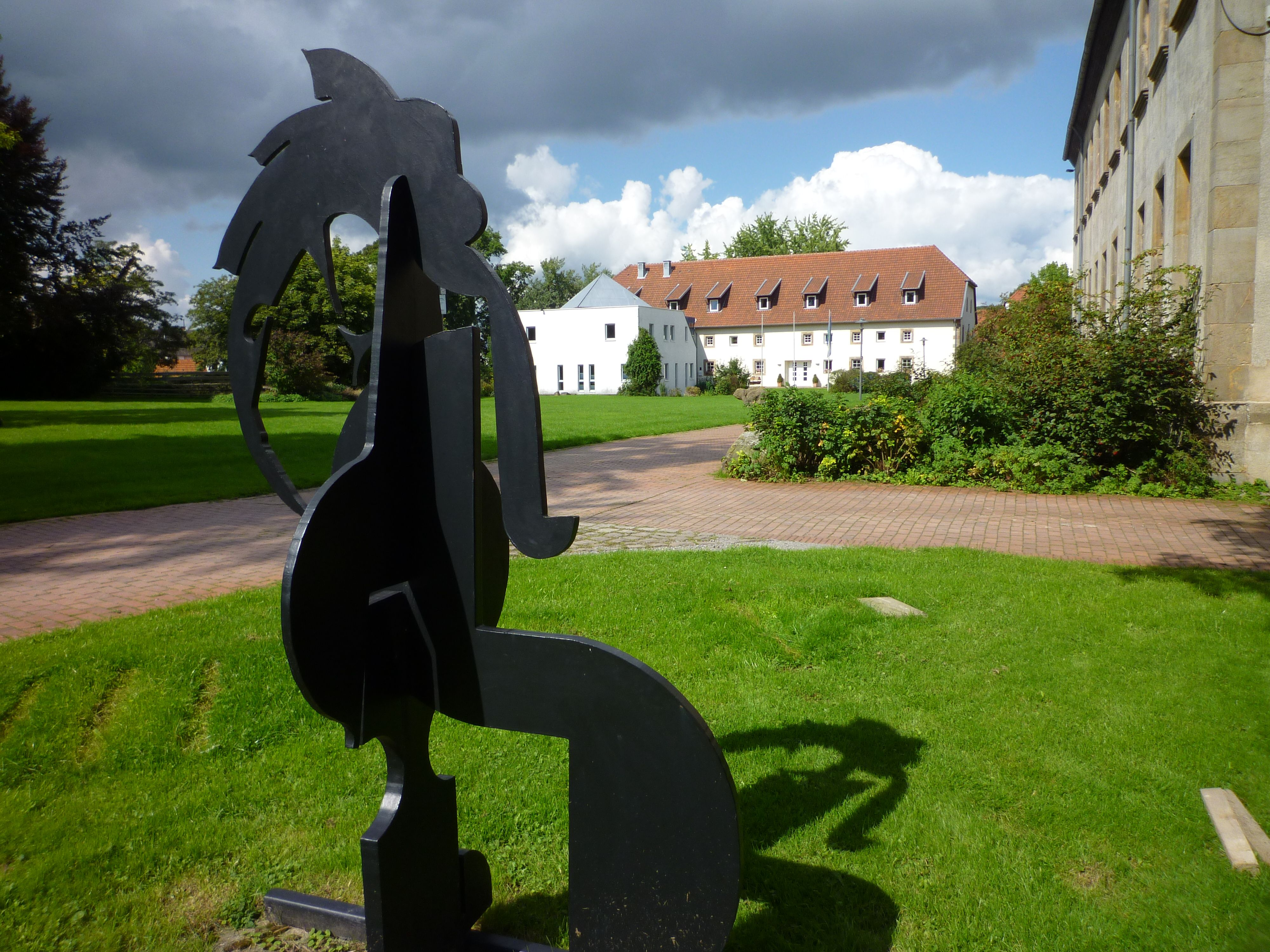 Willebadessen - Ehemaliges Benediktinerinnenkloster, Skulptur_02